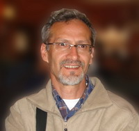 Zekeriya Müyesseroğlu